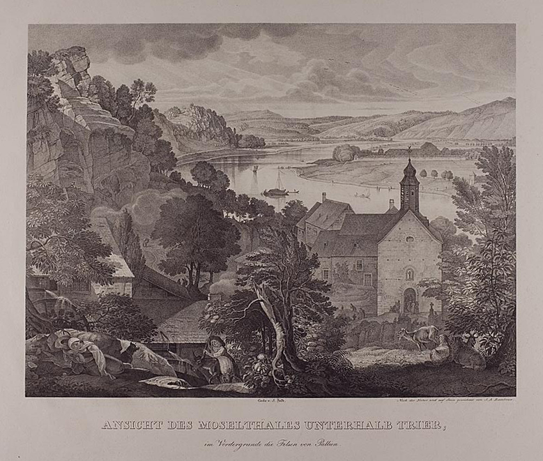 Moseltal unterhalb Trier/Deutschland